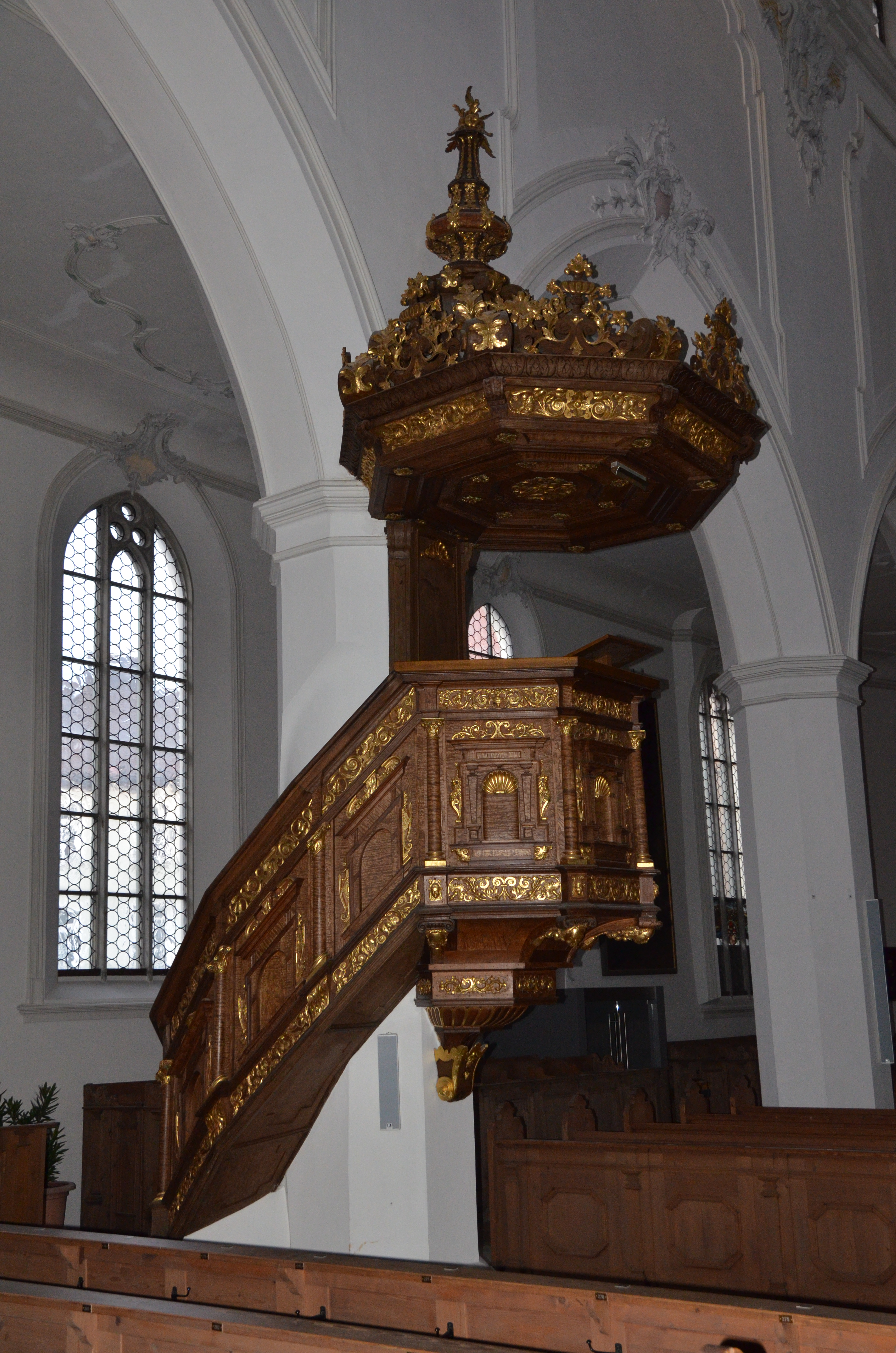 Evang.-Luth. Kirche St. Mang in Kempten